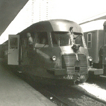 FS ALn 772 1082 in Rimini